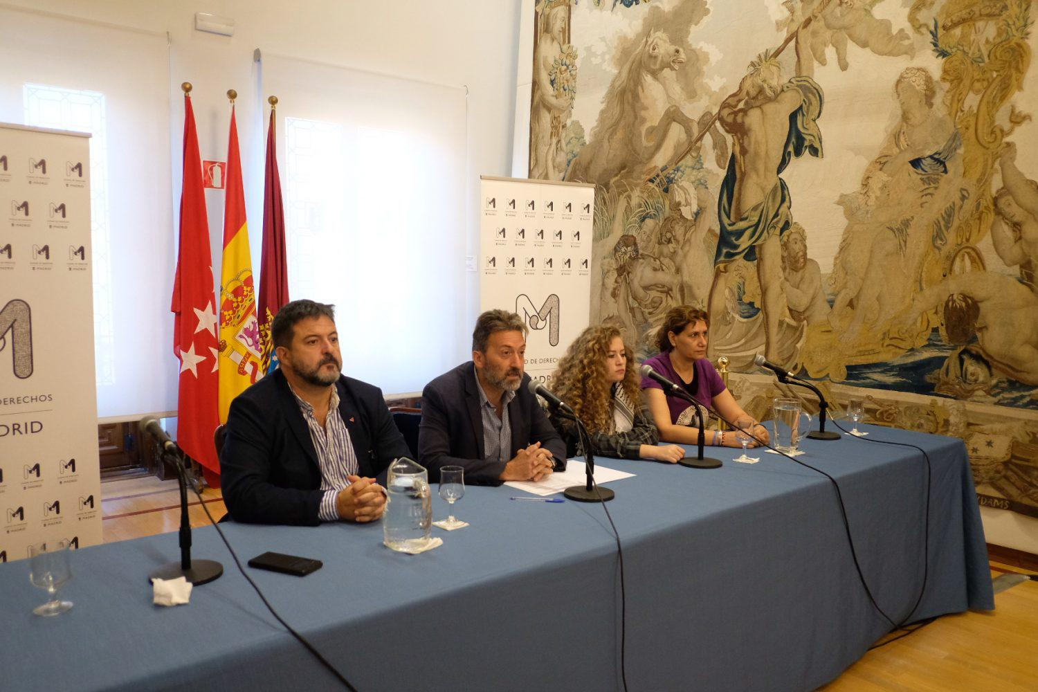 El tercer teniente de alcalde Mauricio Valiente, se ha reunido esta mañana con la activista palestina Ahed Tamimi, en un encuentro en el que ha querido mostrar el compromiso y la solidaridad del Ayuntamiento de Madrid con el pueblo palestino y con los Derechos Humanos y el Derecho Internacional. Valiente ha presentado a Tamimi como “ejemplo de lucha en defensa de los Derechos Humanos en general y de la causa palestina en concreto, representada hoy en ella”.